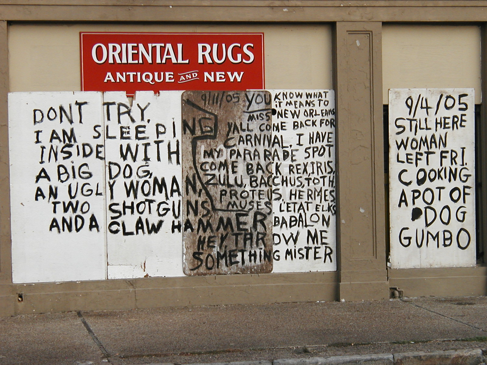 avertissement devant un magasin à l'abandon à La Nouvelle-Orléans